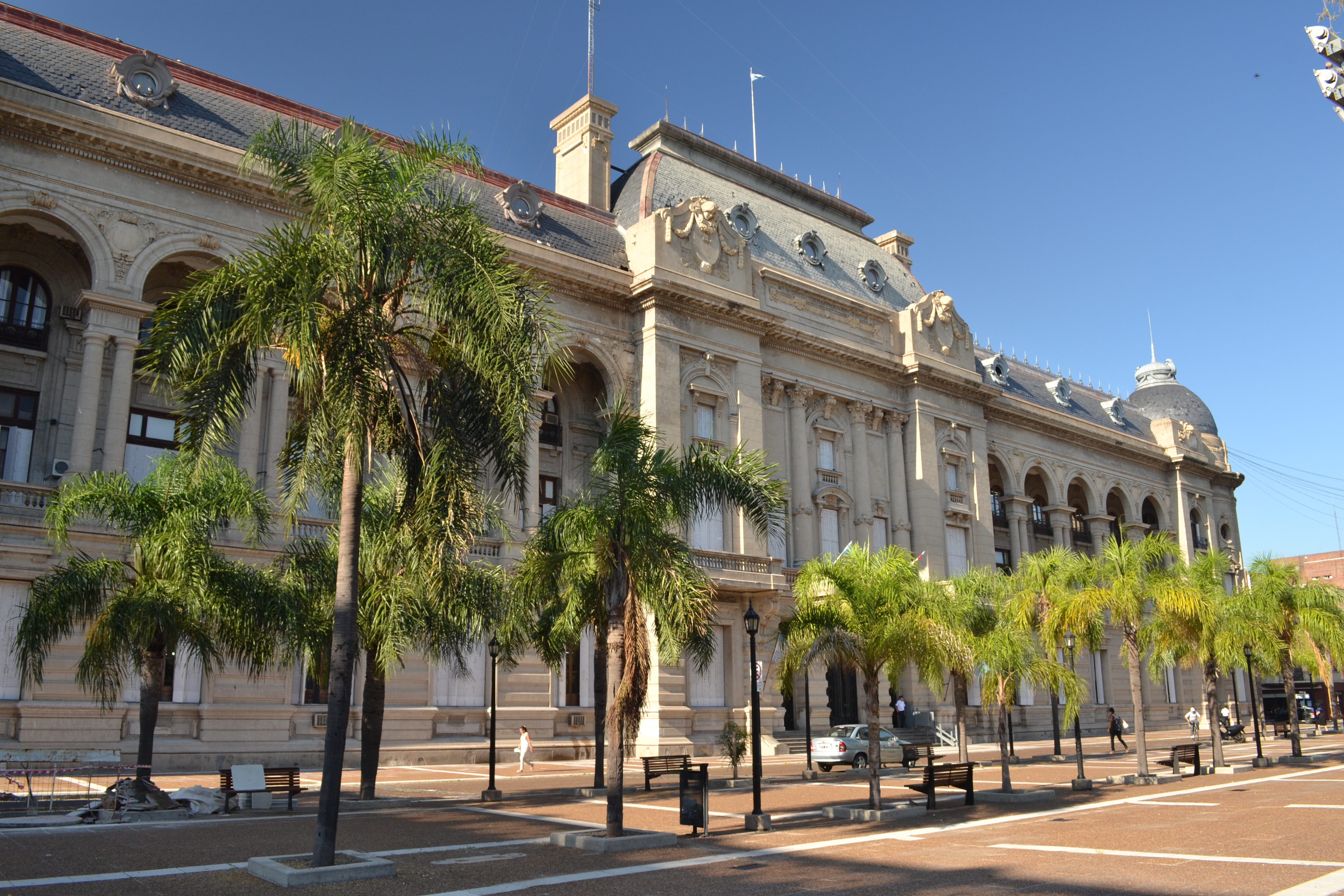 Casa de Gobierno de Santa Fe, la fachada principal.